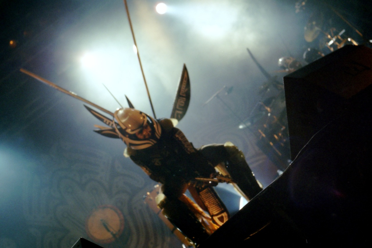 Blasted Mechanism no Enterro da Gata. 8/135mm (with M42 Adapter)